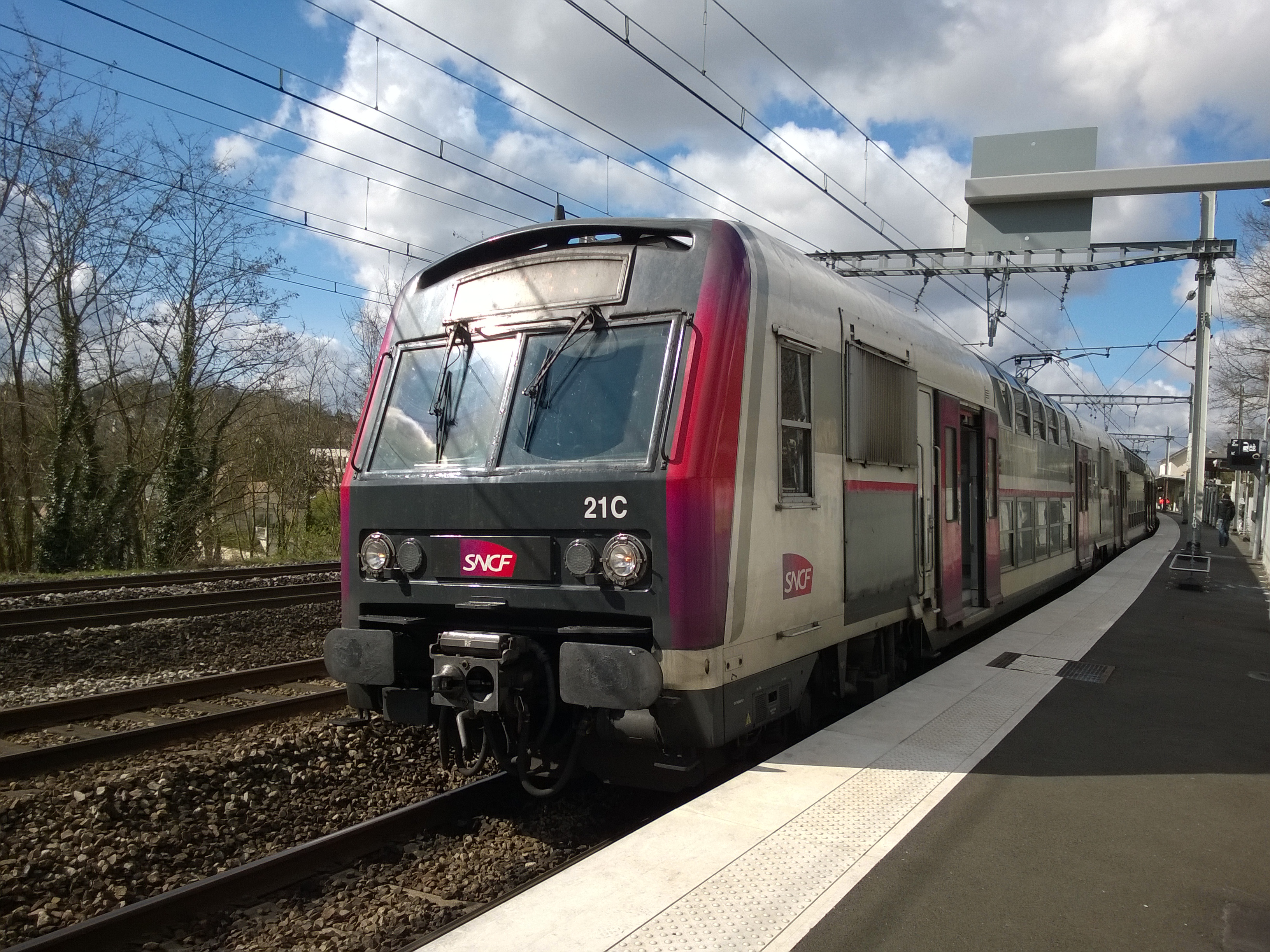 En gare d'Épinay-sur-Orge, une rame de tête Z 5600 vers Invalides ou Saint-Quentin-en-Yvelines, contrairement à ce qui est indiqué sur le titre.